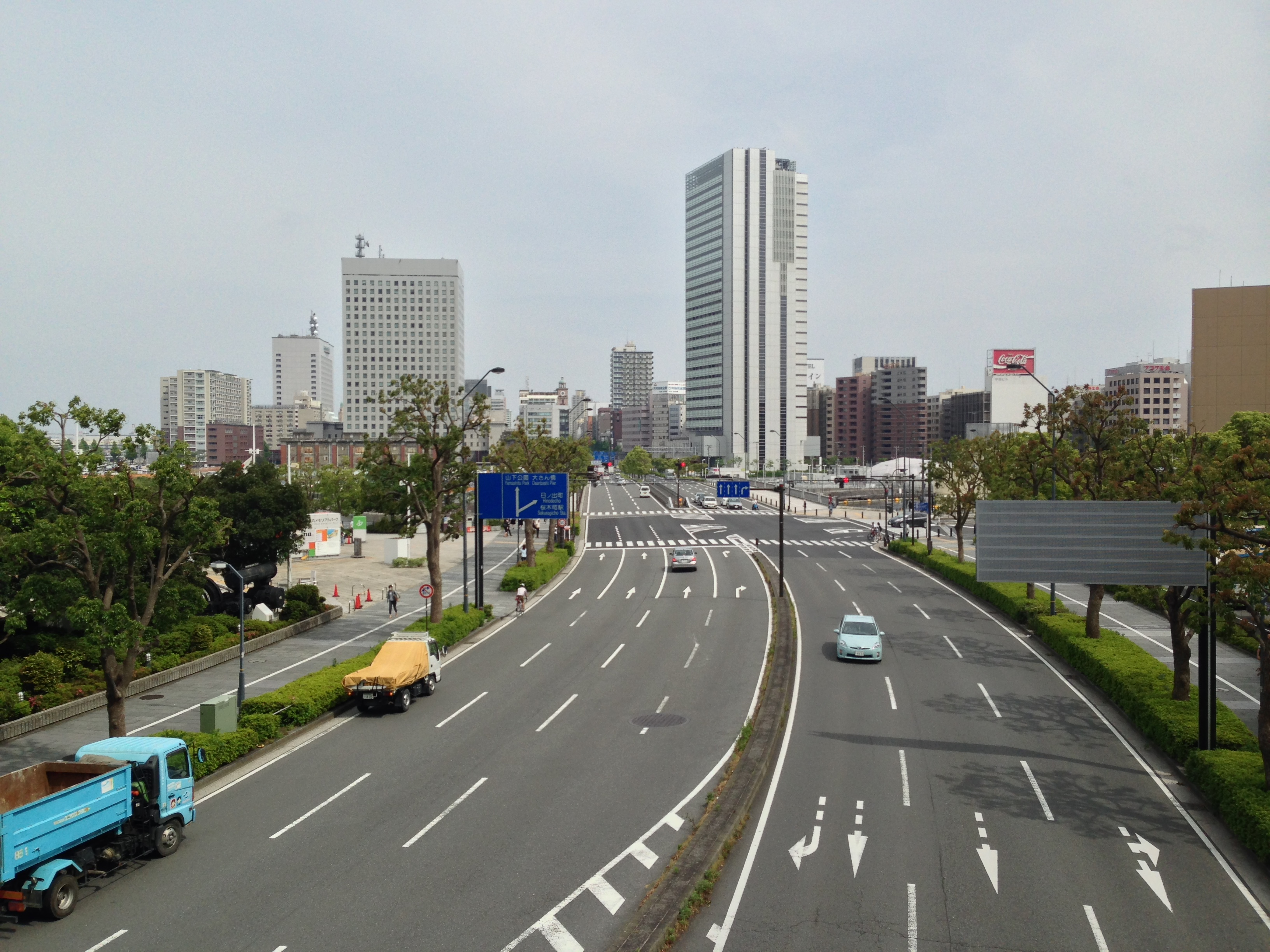 みなとみらい大通り（栄本町線）。動く歩道上より北仲通地区方面を見る。